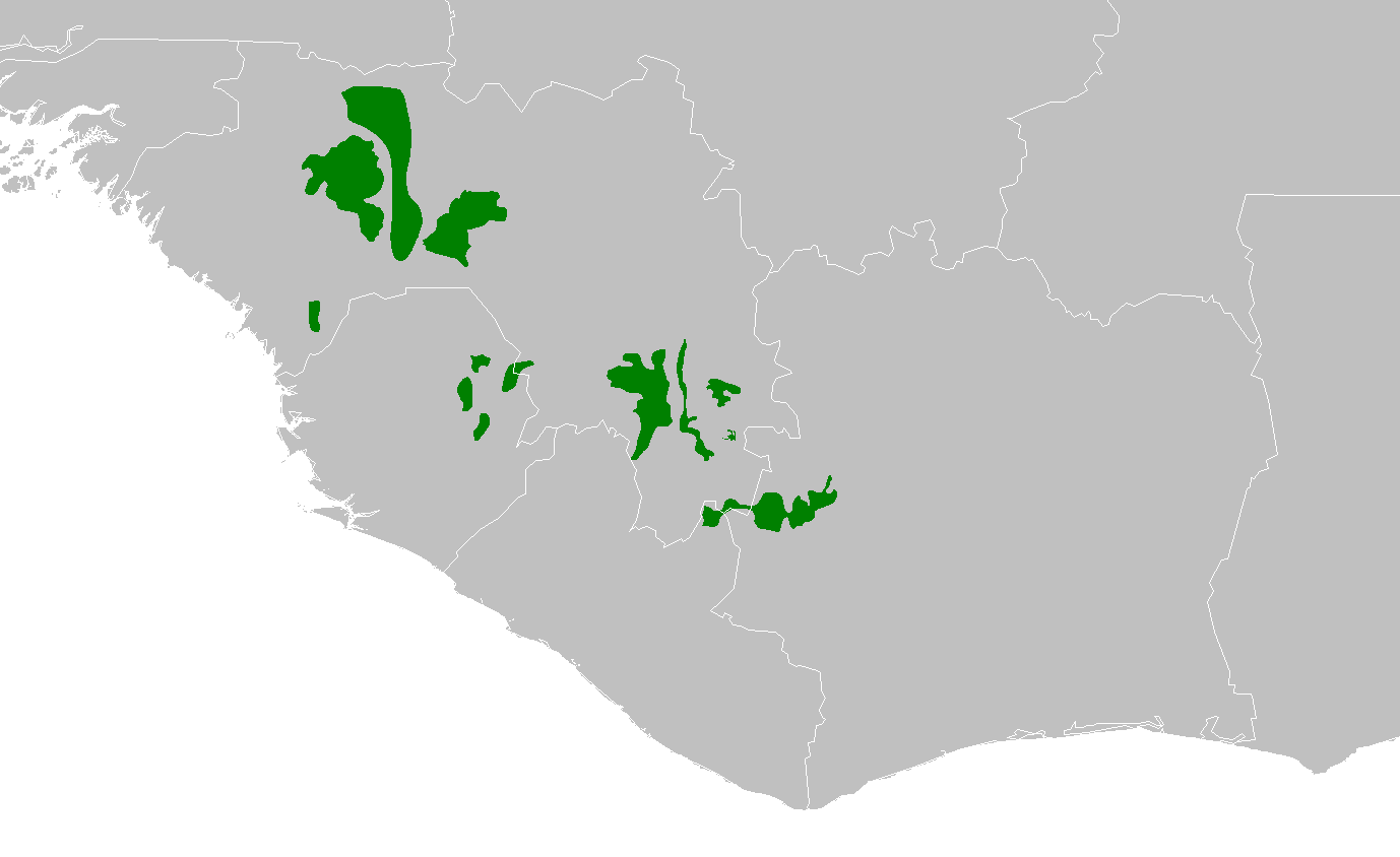 Guinean montane forests ecoregion map